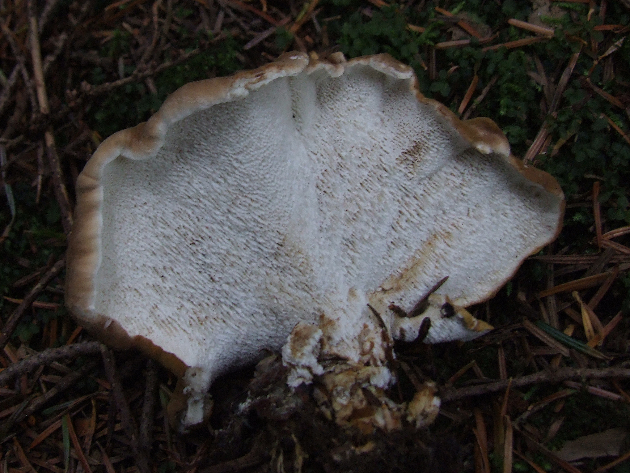 Albatreus cristatus